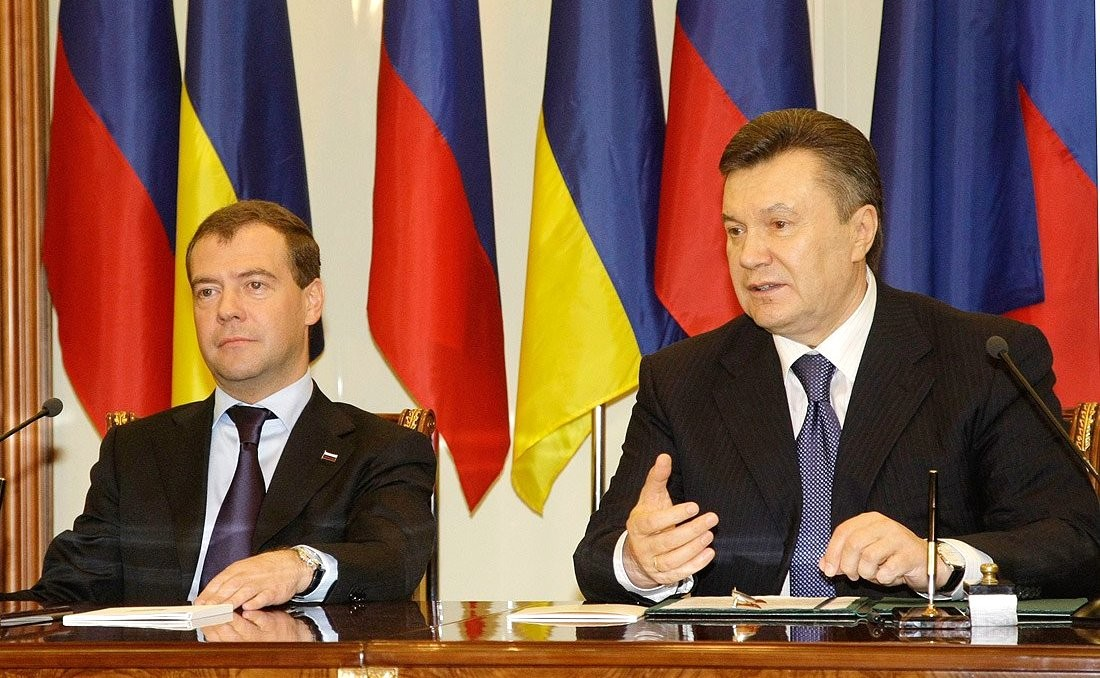 Председатель правления ОАО «Газпром» Алексей Миллер (слева) и глава правления НАК «Нафтогаз Украины» Евгений Бакулин (справа) подписали дополнения к контрактам об условиях купли-продажи и транзита российского газа в 2009–2019 годах.